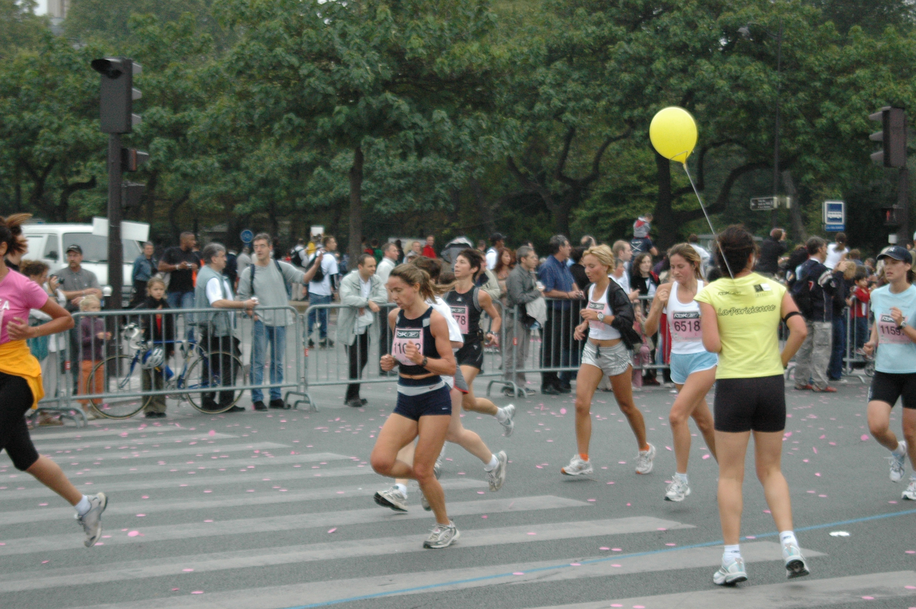 la Parisienne